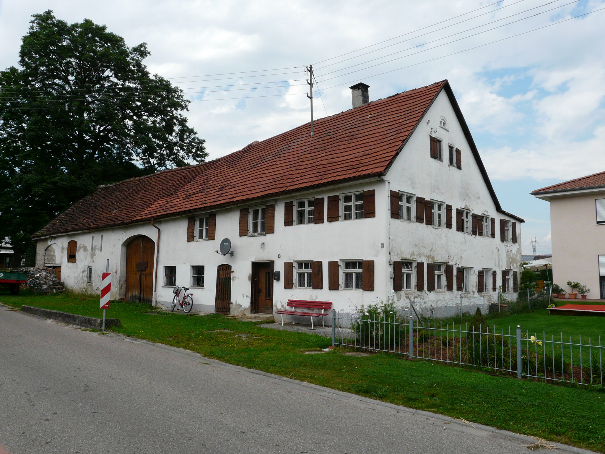 Bauernhaus in Breitenbrunn, Unterallgäu